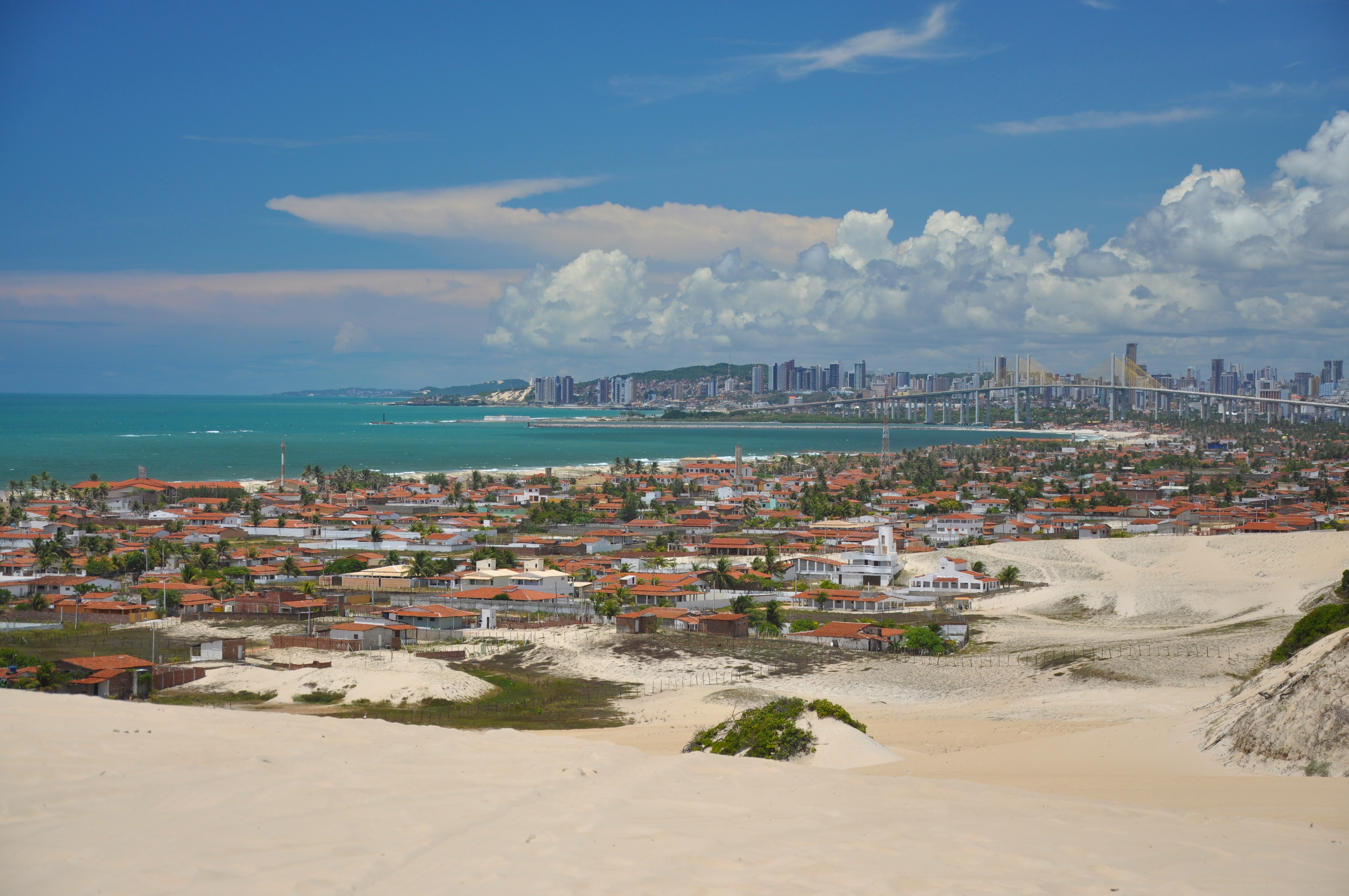 Redinha, Natal, RN, Brazil.